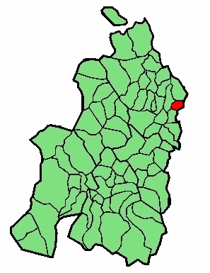 aipaturiko udalerriaren kokapena Nafarroa Beherean